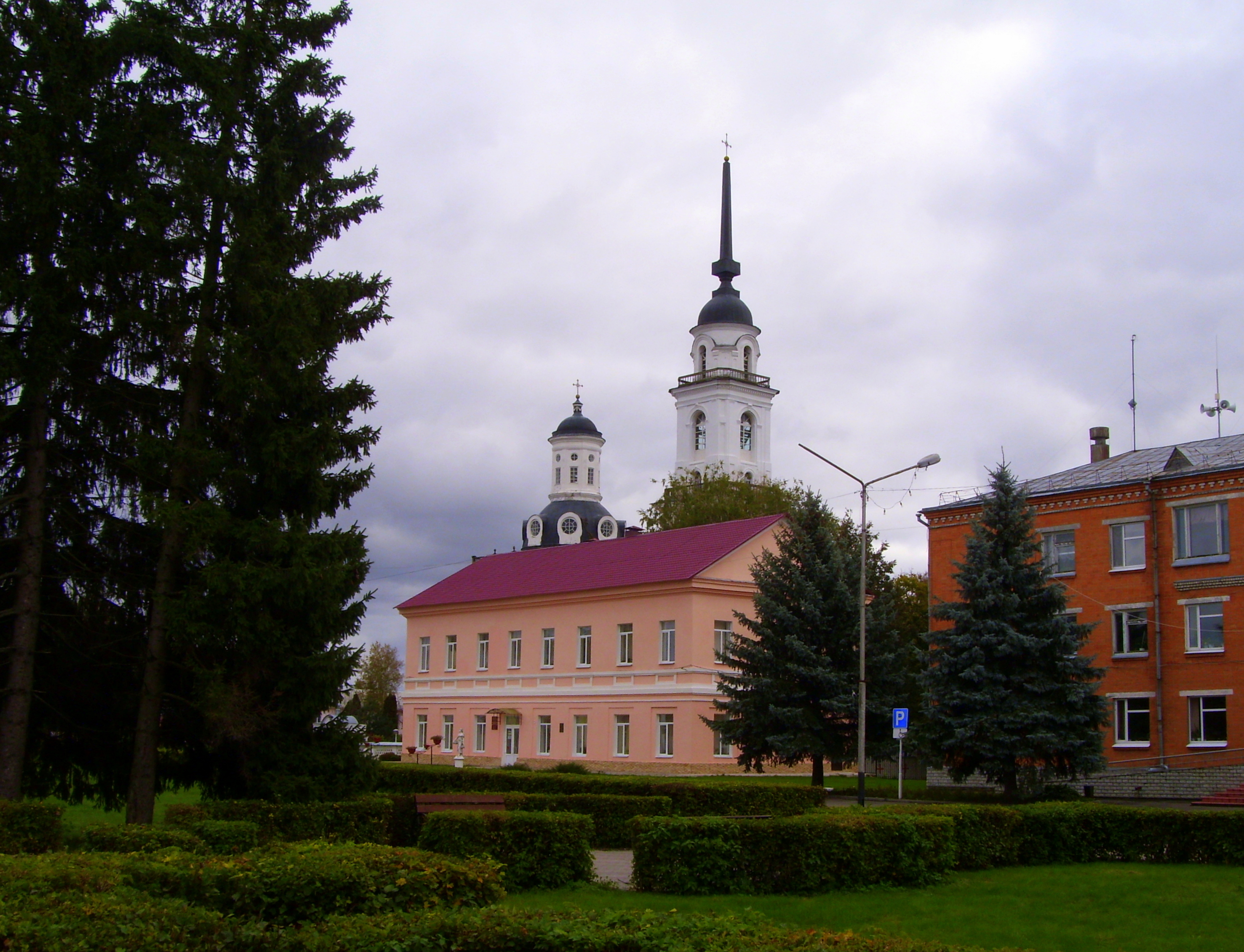 Собор Воскресенский (церковь Вознесения) (Брянская область, Почеп, Октябрьская площадь)